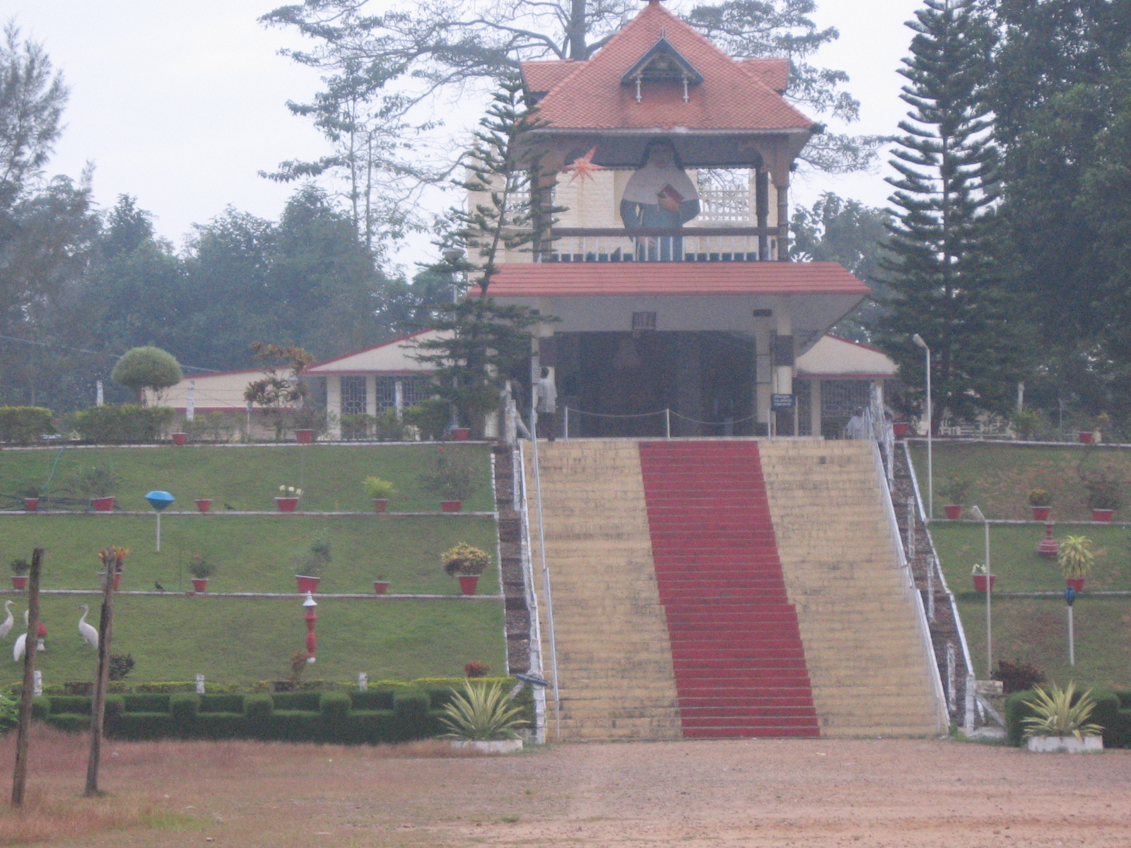 ഭരണങ്ങാനത്തെ അൽഫോൻസാ തീർഥാടന കേന്ദ്രം